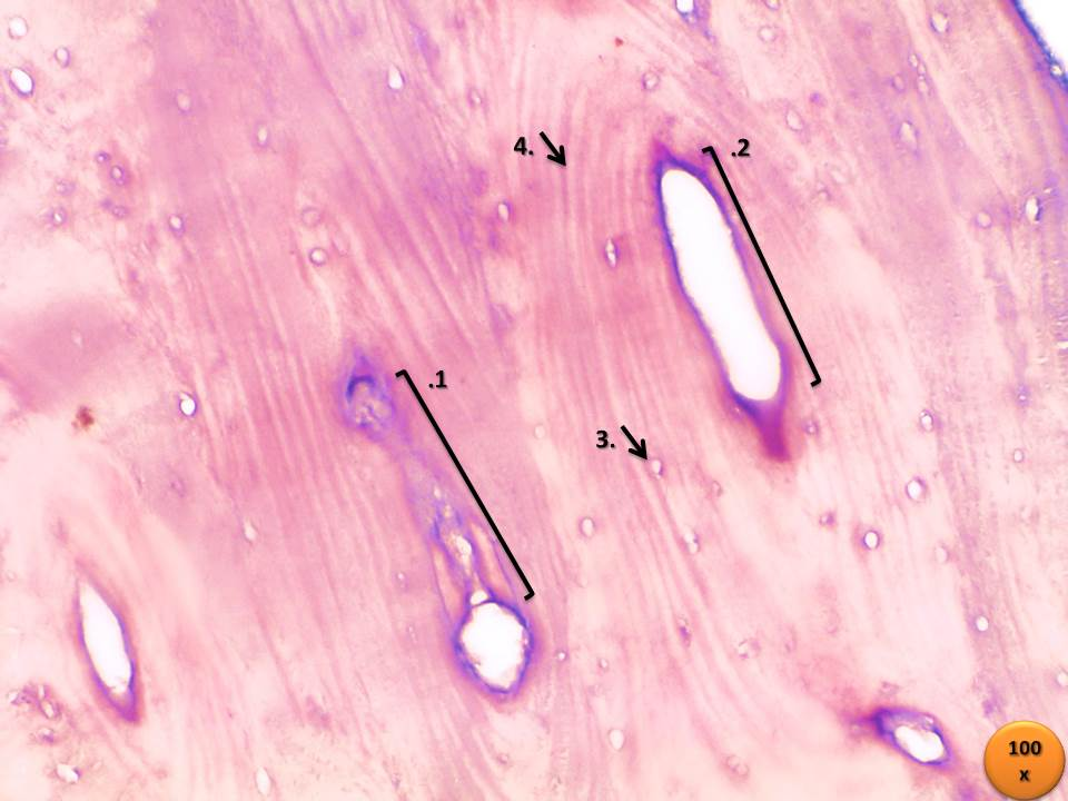 Osso por Descalcificação – HE – 100x Legenda: 1.Canal de Volkmann 2.Canal de Havers 3.Lamelas 4.Lacuna